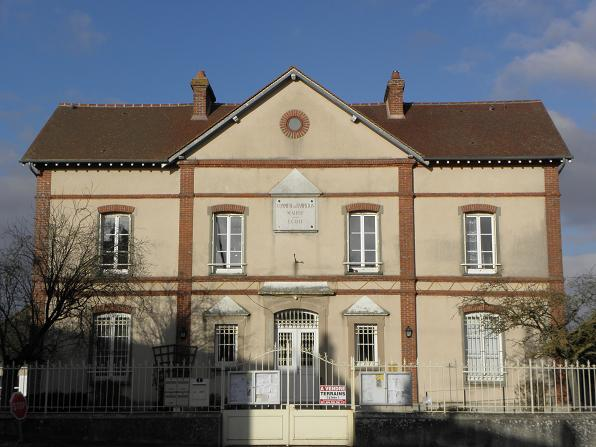 Mairie de Rampillon (77).